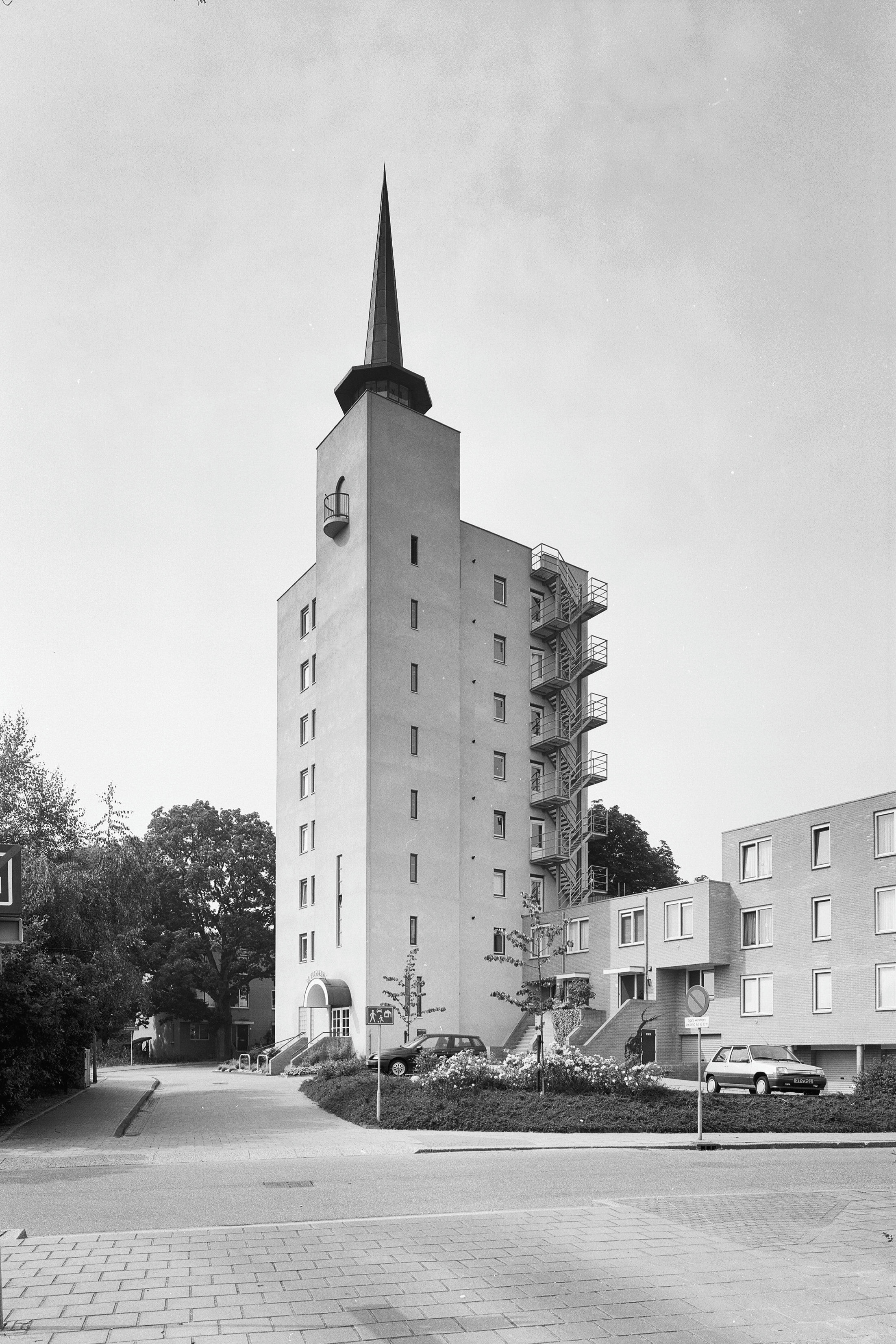 De Koerheuvel: Watertoren (opmerking: Gefotografeerd voor De Utrechtse Heuvelrug)